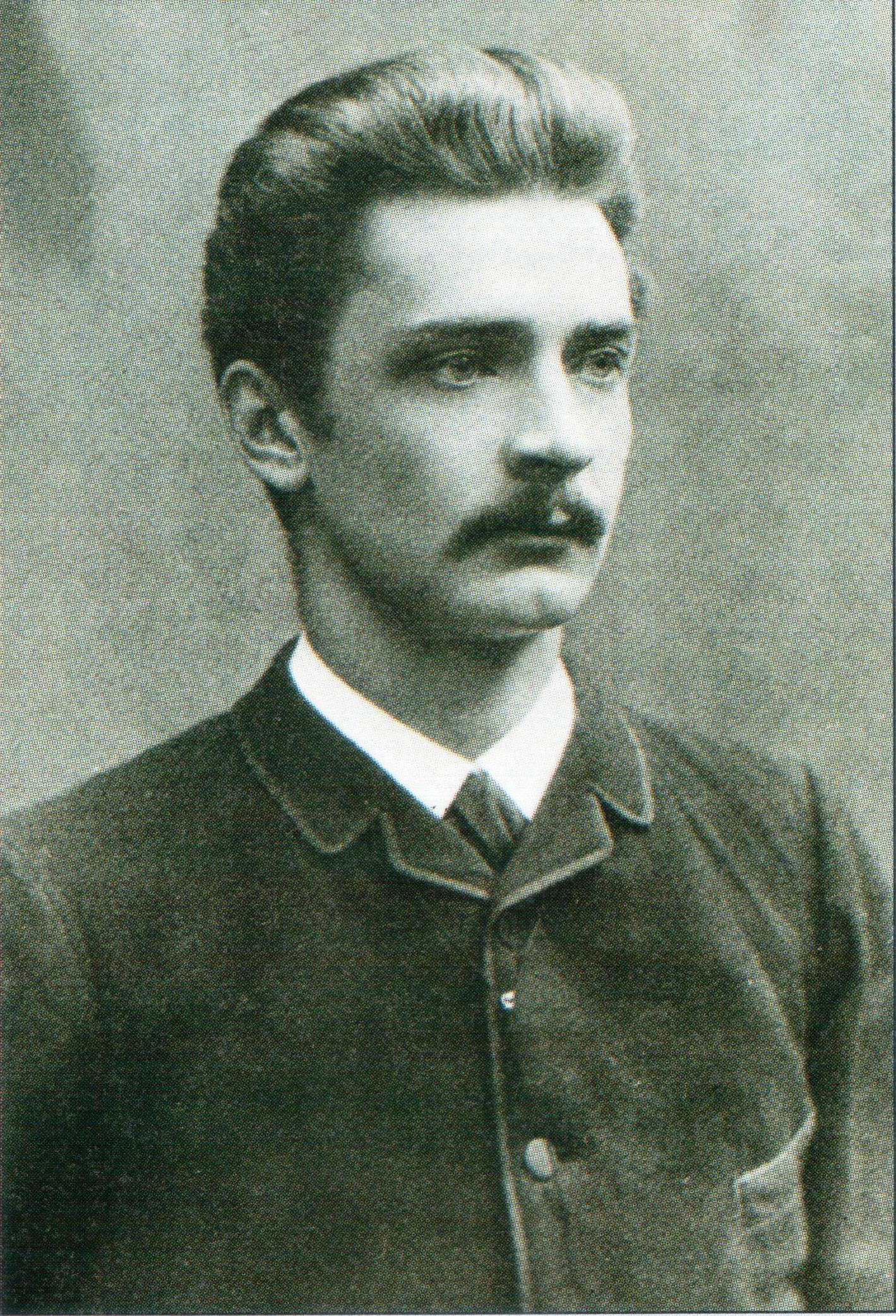 K. J. Ståhlberg nuorena ylioppilaana.